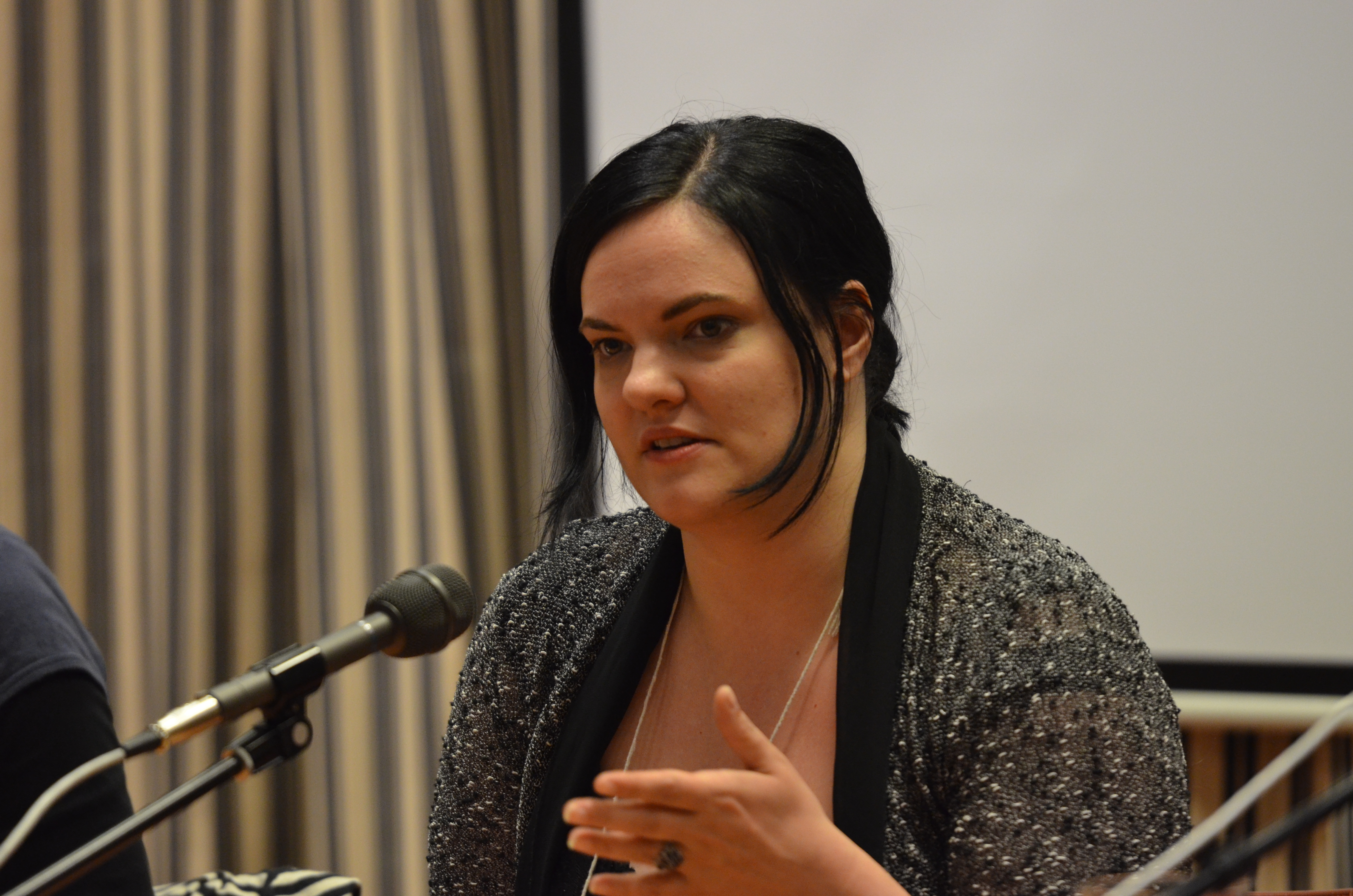 Science fiction- och fantasyförfattare Catherynne M. Valente på Åcon 5, 2012.